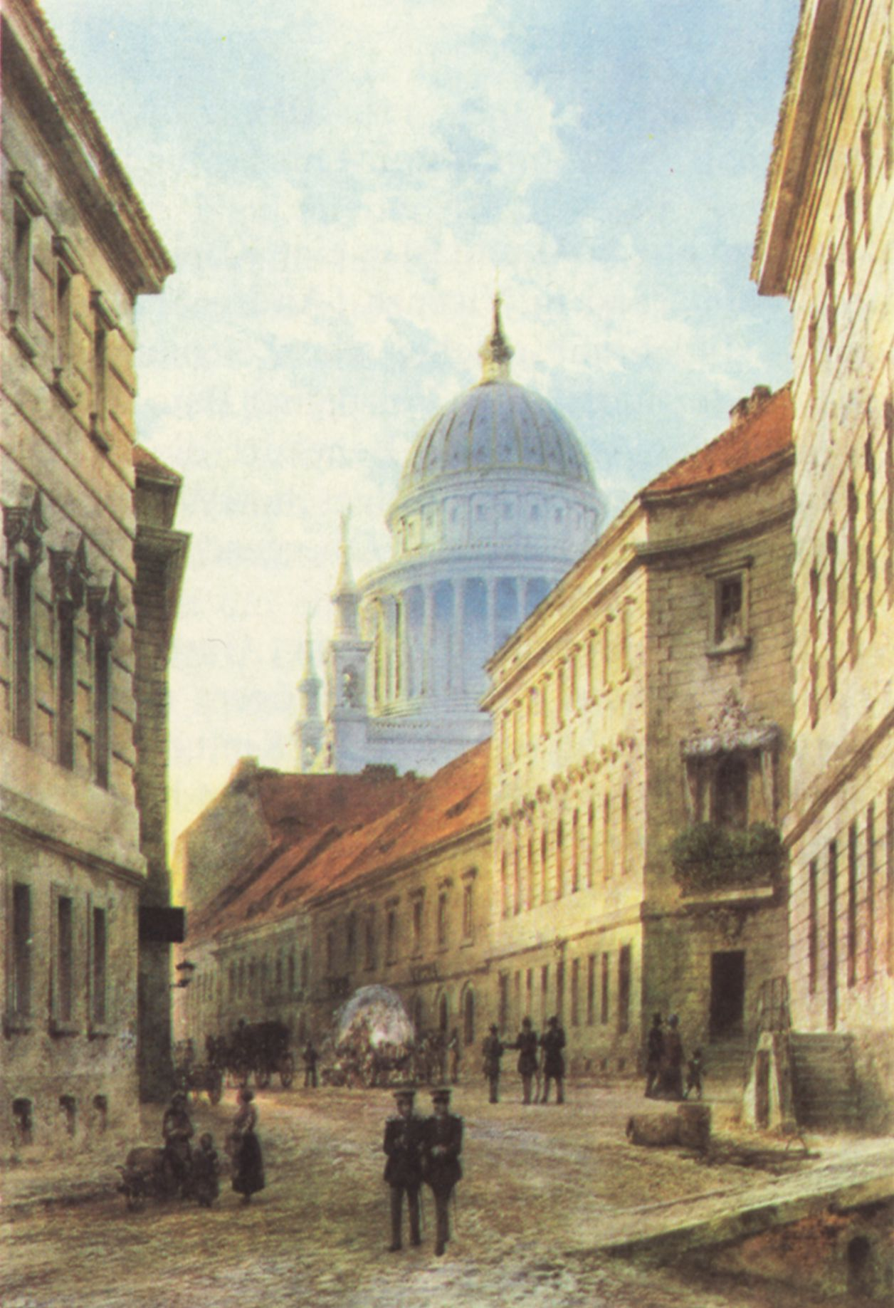 Blick auf den ehemaligen Platz namens Acht Ecken in Potsdam. Im Hintergrund steht die Nikolaikirche. Heute steht nur noch das linke Gebäude am Achteckenplatz.